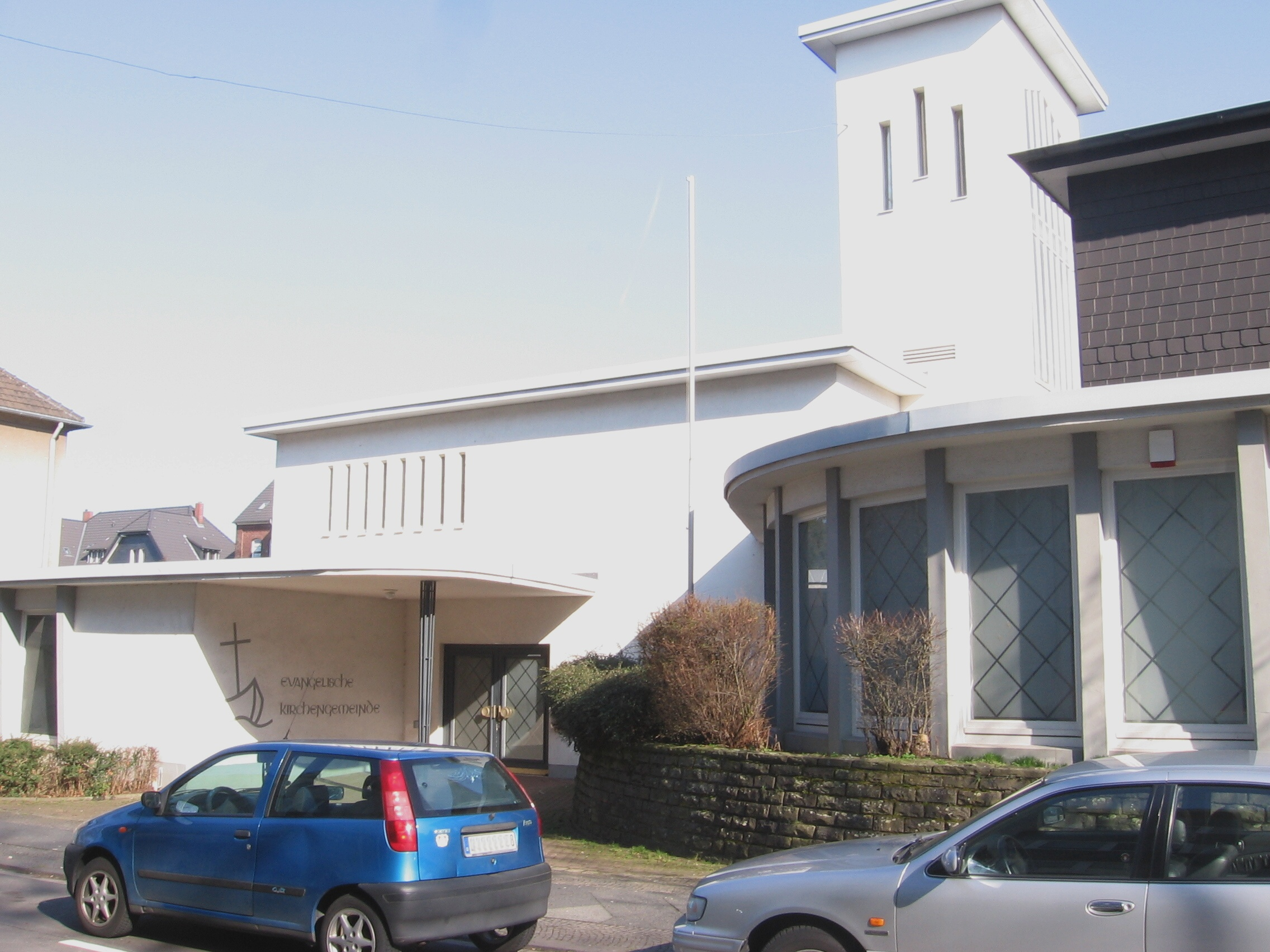 Evangelisches Gemeindehaus Humboldtstraße in Leverkusen Opladen